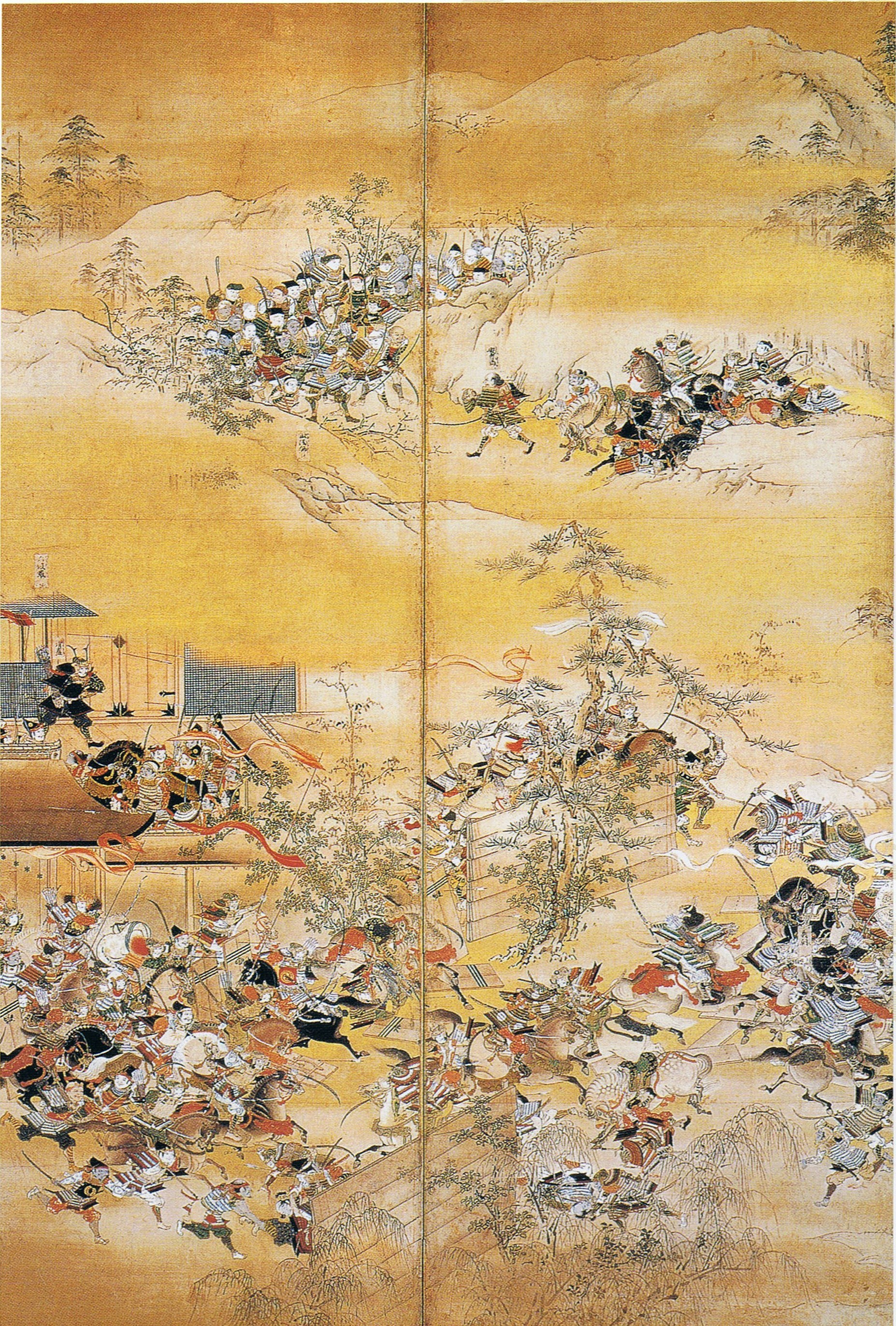 保元の乱。格子の前の黒い鎧武者が平清盛。